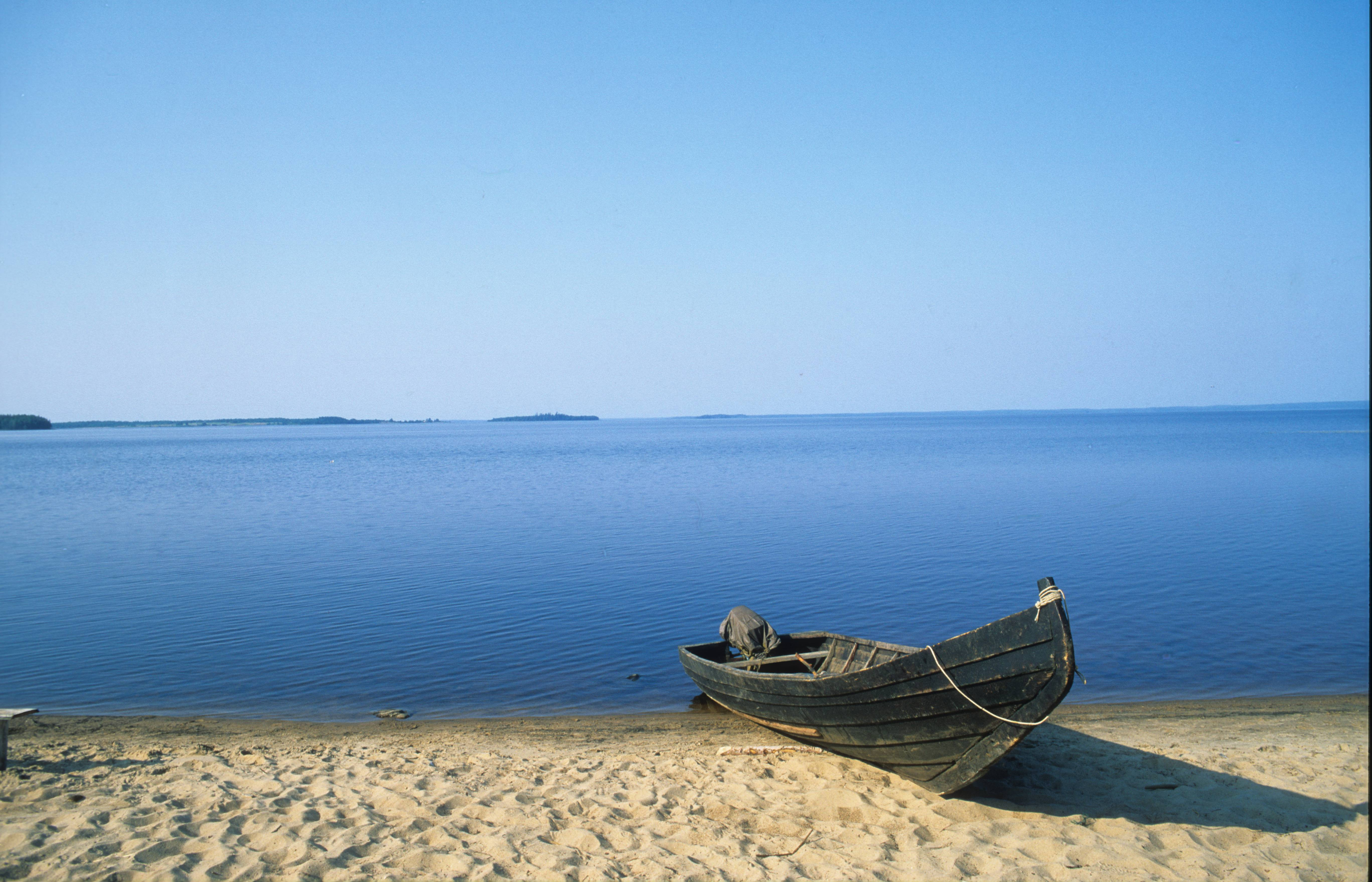 Водлозерский национальный парк: Пудожский район, This image is related to the protected area of Russia number 1000188